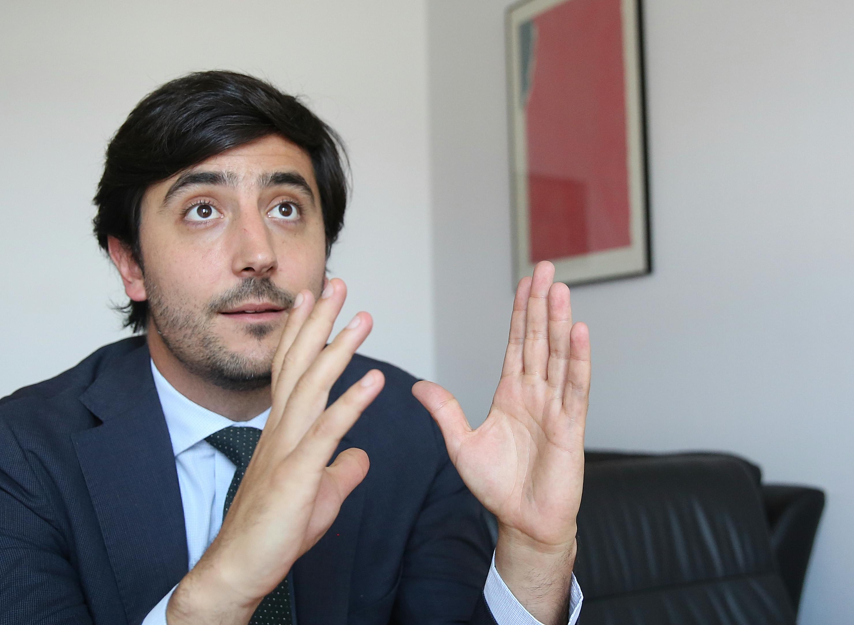 Toni Roldán, portavoz de C's en la Comisión de Investigación sobre la crisis financiera de España, asegura que quieren que "el PP y el PSOE nos expliquen cómo os la llevasteis cruda durante esos años". "Hubo presidente autonómicos que utilizaron las cajas como mecanismos de financiación de proyectos personales y políticos"